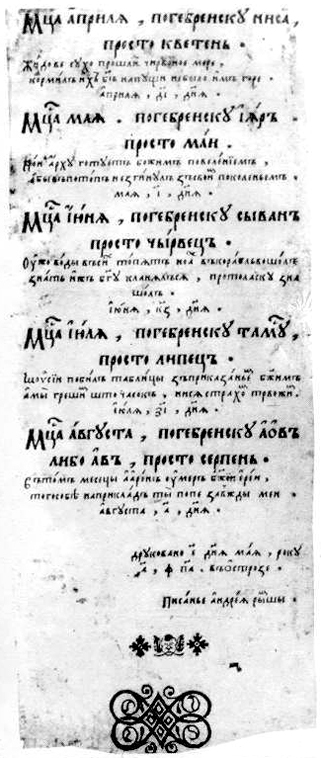 Храналогія 1581, Андрэй Рымша, стар. 2 Беларуская (тарашкевіца): Храналёгія 1581